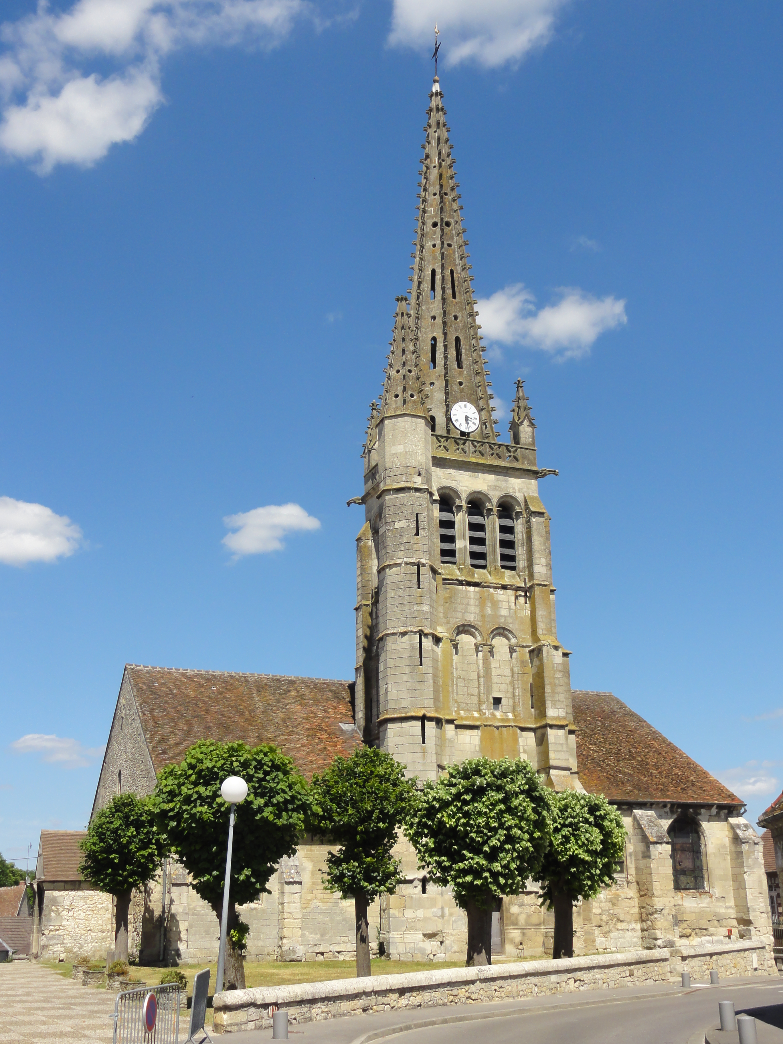 Église Saint-Martin de Venette, vue depuis le sud.